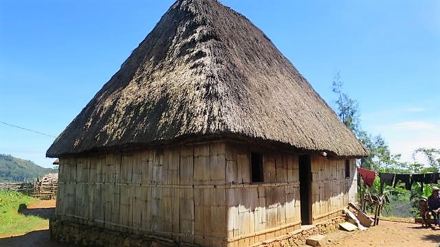 Hütte in Eraulo, Letefoho, Ermera, Osttimor